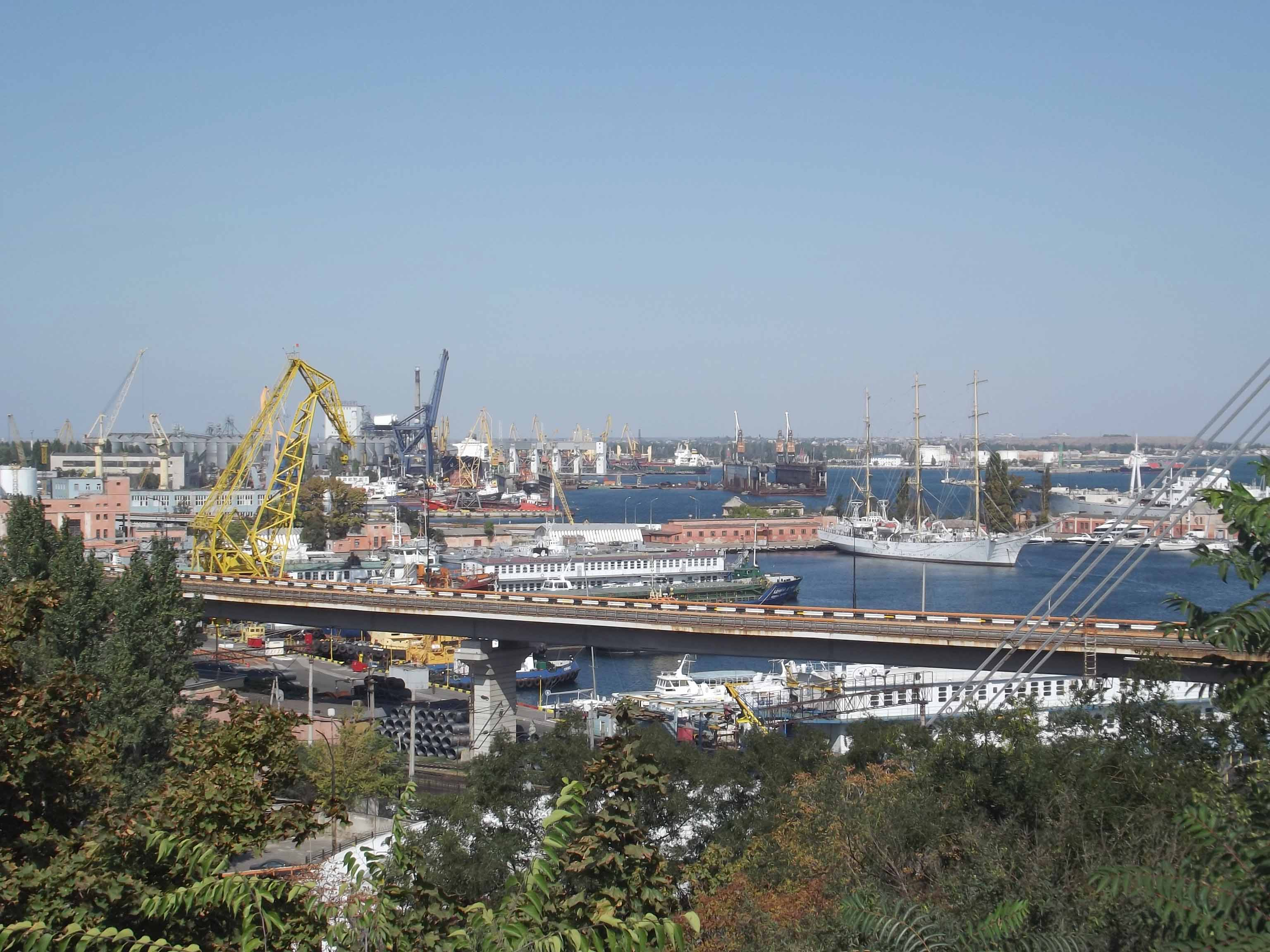 Вид на Одесский морской порт